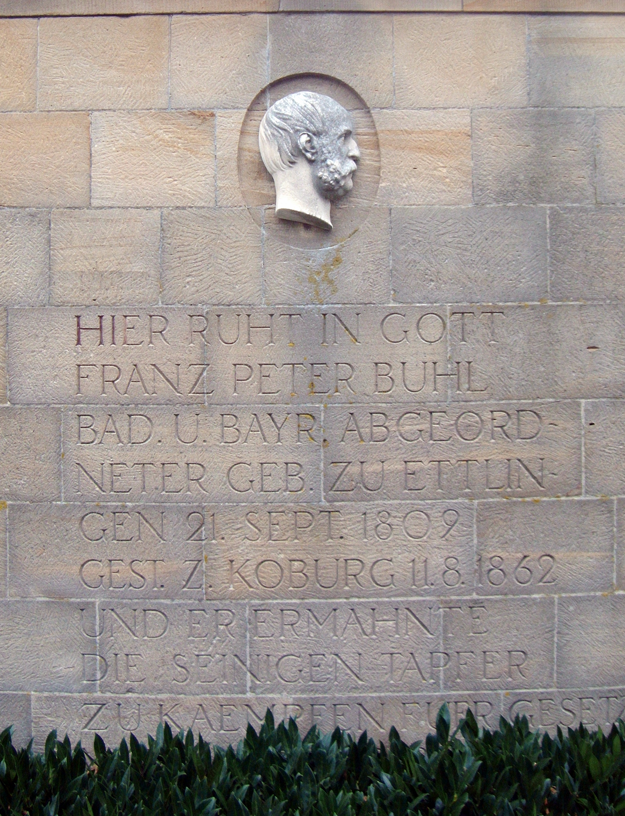 Franz Peter Buhl (1809-1862), bayerischer und badischer Landtagsabgeordneter, Grab auf dem Friedhof Deidesheim